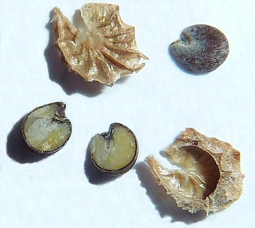 Malva parviflora (Malva, malva de flor chica): Mericarpo abierto, y semillas suelta y cortada - Descampado c./San Antonio con Compositor Manuel Berná García, Albatera (Alicante, España).